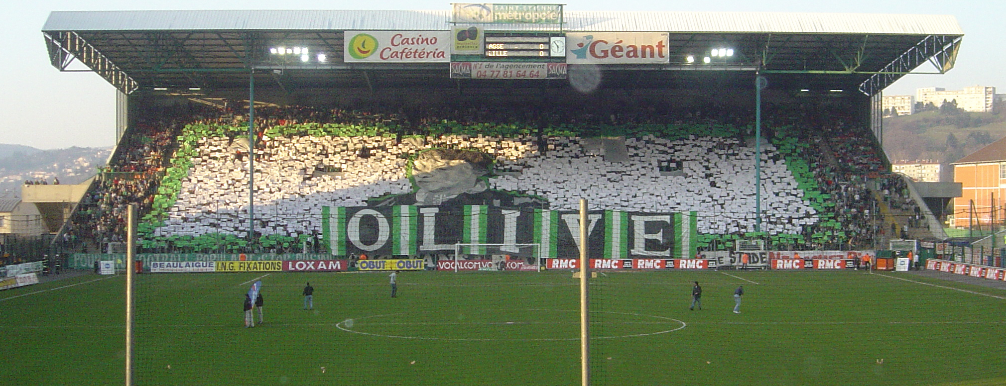 Photo du tifo de football du Stade Geoffroy Guichard réalisé lors de la saison 2004-2005 pour la venue du LOSC au chaudron le 20 mars 2005 (0-0, 28.708 Spectateurs). Il est étendue sur le Kop Nord (Tribune Charles Paret). Ce tifo représente "Olive", qui était l'un des leaders du groupe des Magic Fans et qui est décédé d'un cancer. Cette photo a été prise par Mickaël Roure alias Altrensa pour Wikipédia le 20 mars 2005. Elle ne saurait être utilisée sans la mention de son auteur. D'avance merci. Licensing Catégorie:Image de l'ASSE